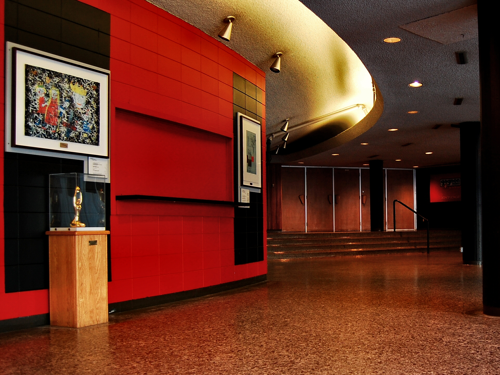 Entrée de l'Auditorium Dufour, Décembre 2007